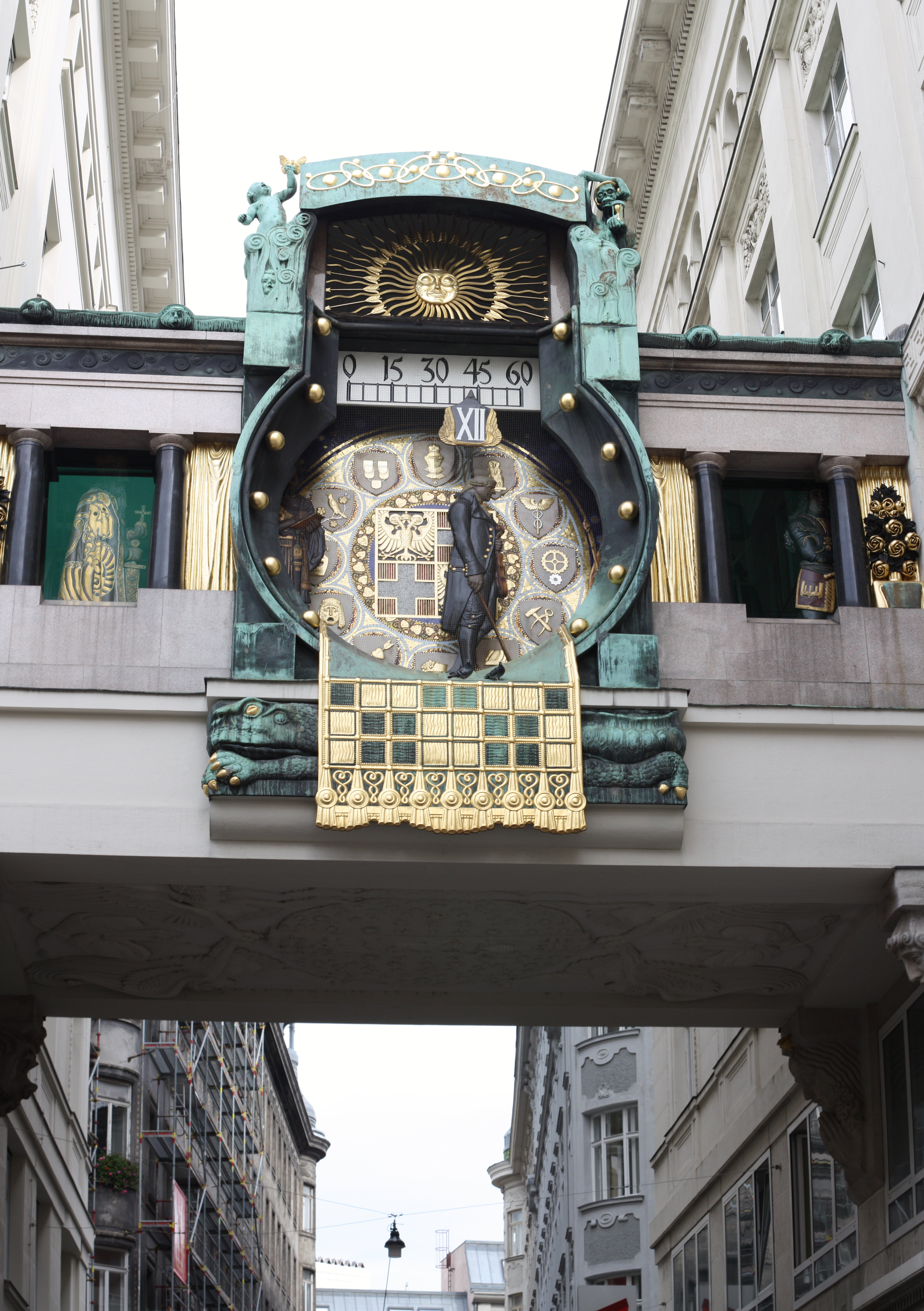 Ankeruhr, Wien, Vienna